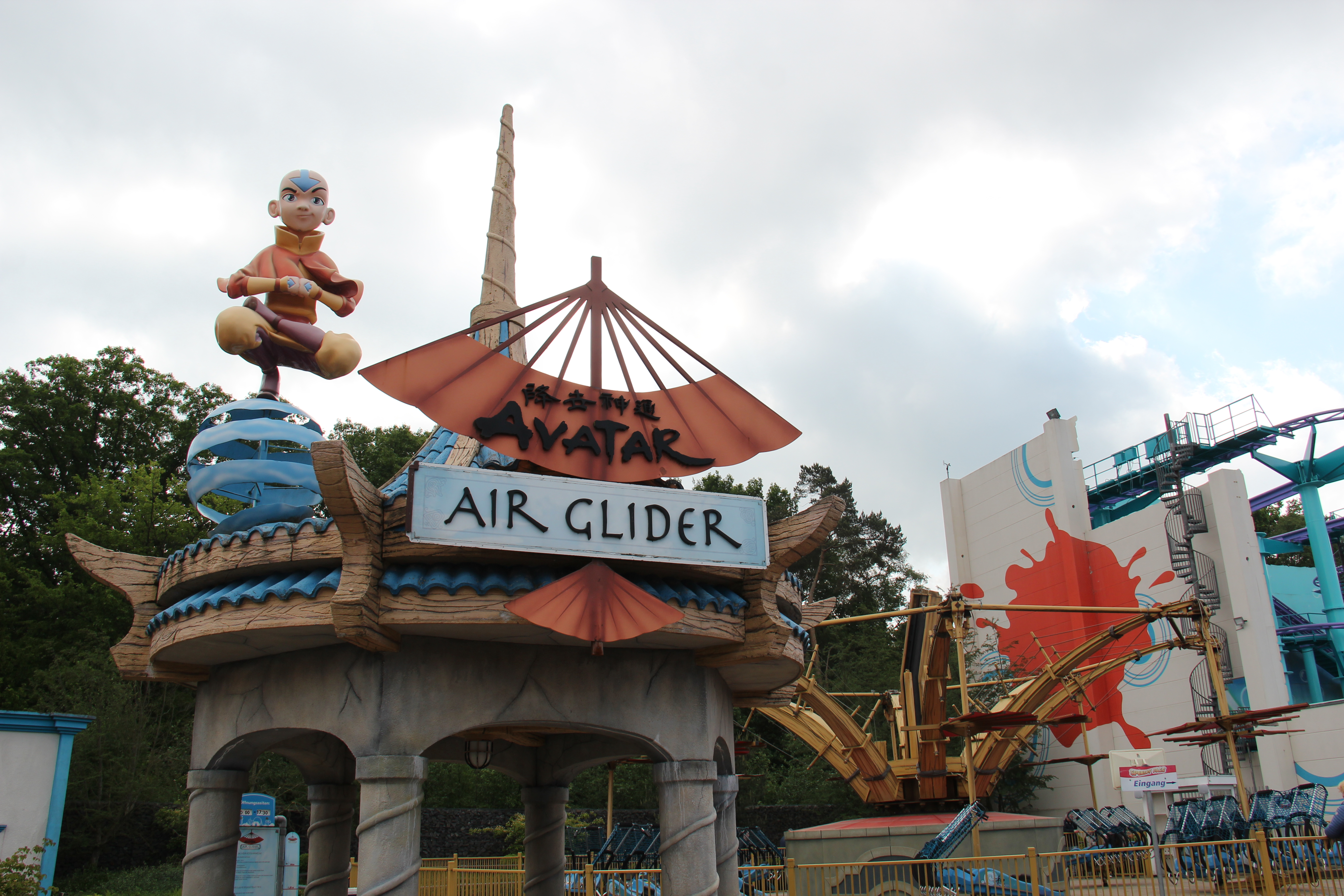 Avatar Air Glider in Movie Park Germany